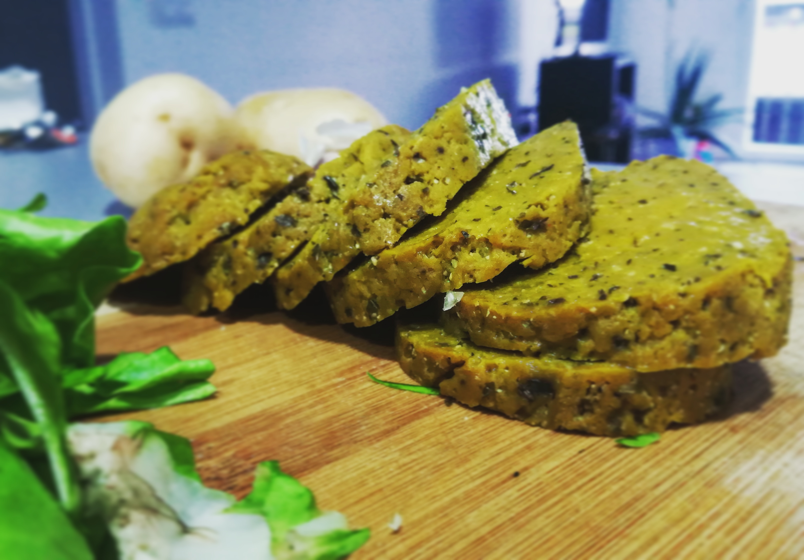 Seitán casero.